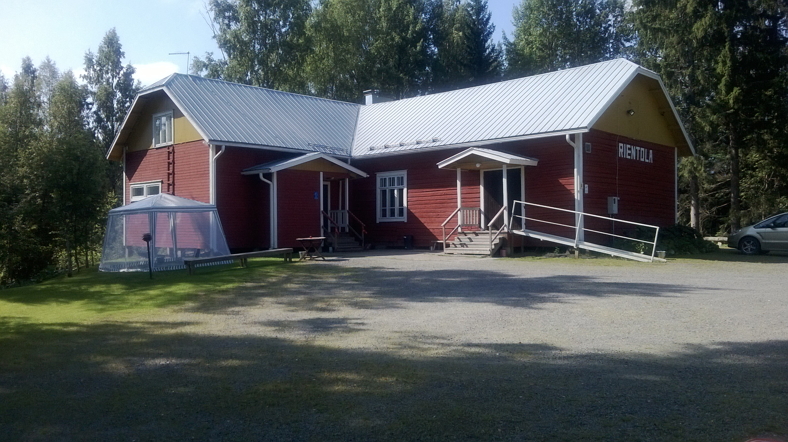 Kylätalo Rientola, Vesanka Jyväskylä